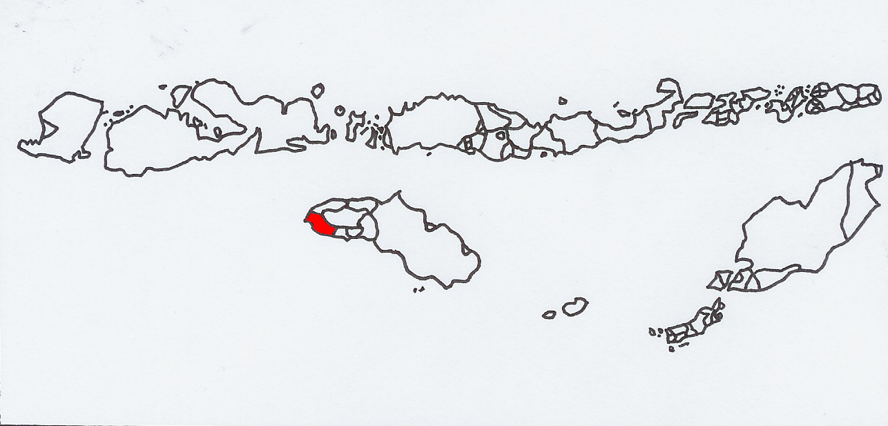 Het Kodisch tussen de andere talen van het Indonesische gedeelte van de Kleine Soenda-eilanden. Eigen werk, publiek domein.